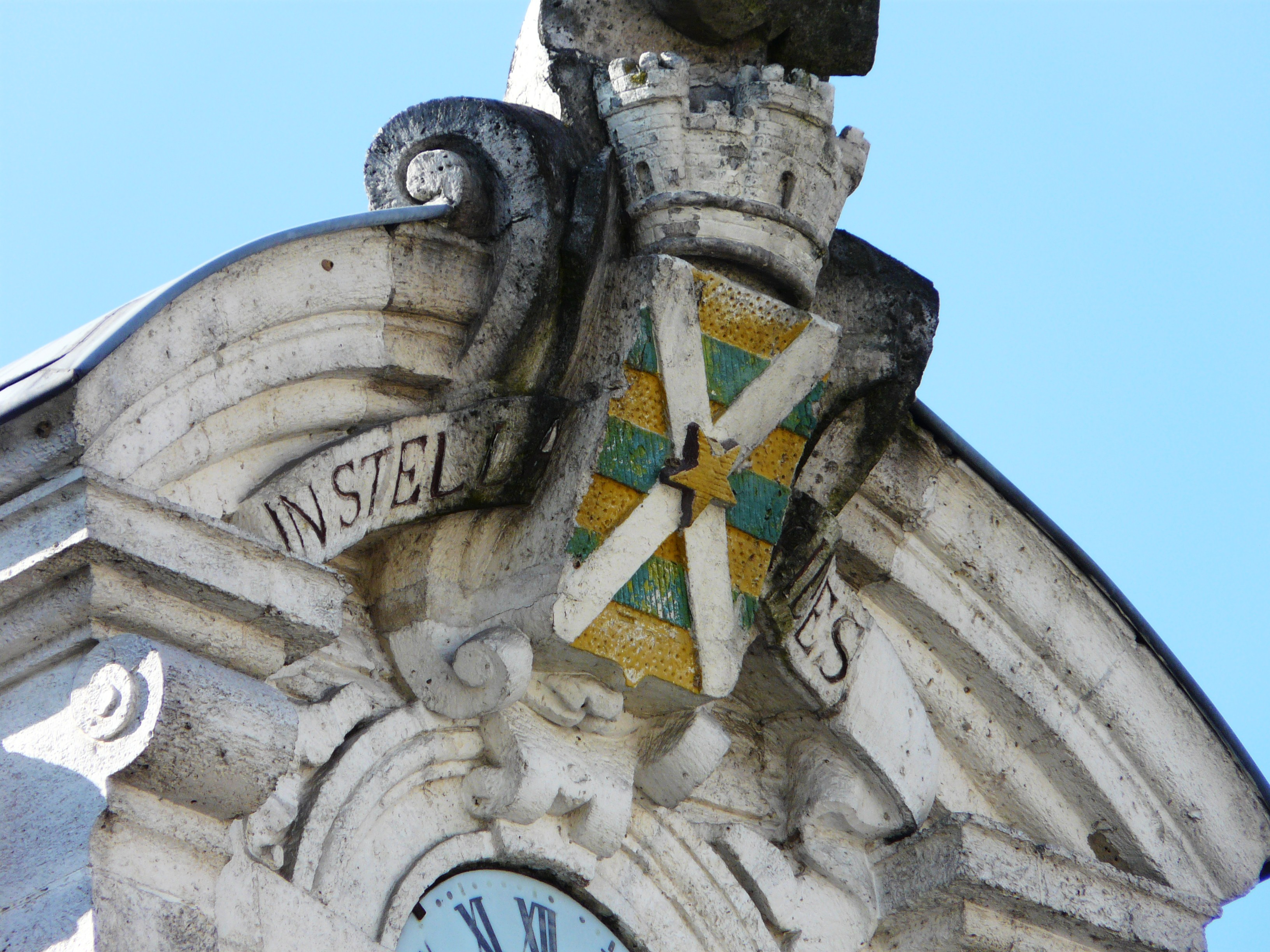 Les armoiries de Ribérac sur la façade de l'immeuble de la Caisse d'épargne, place Nationale, Ribérac, Dordogne, France.